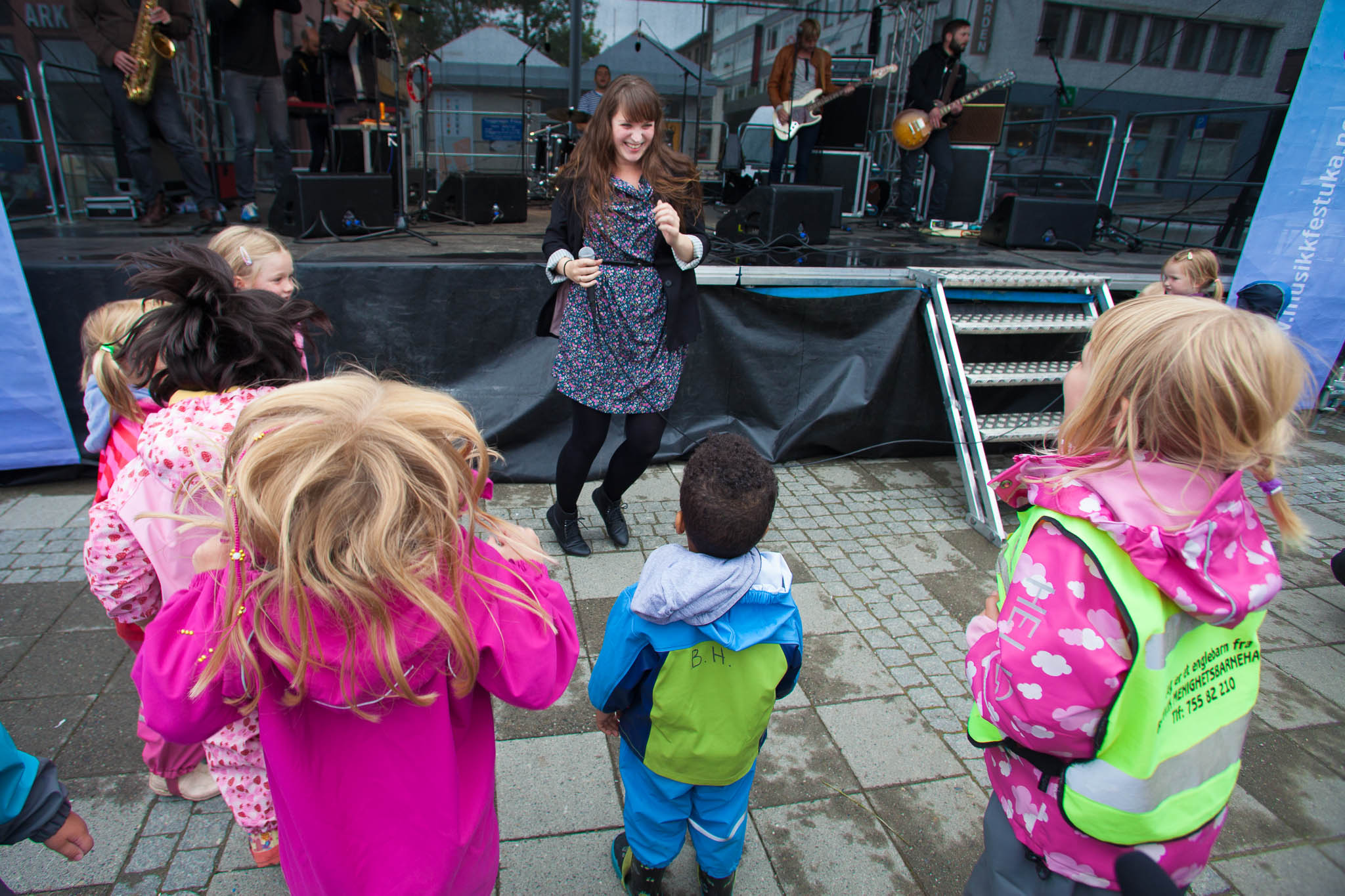 Bandet Hopalong Knut leker med barna på Bodø torg under Nordland musikkfestuke 2011